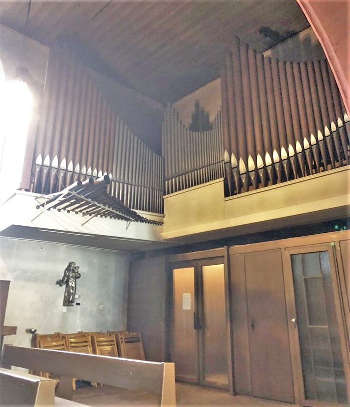 Wallfahrtskirche Maria vom rauhen Wind in Kälberau